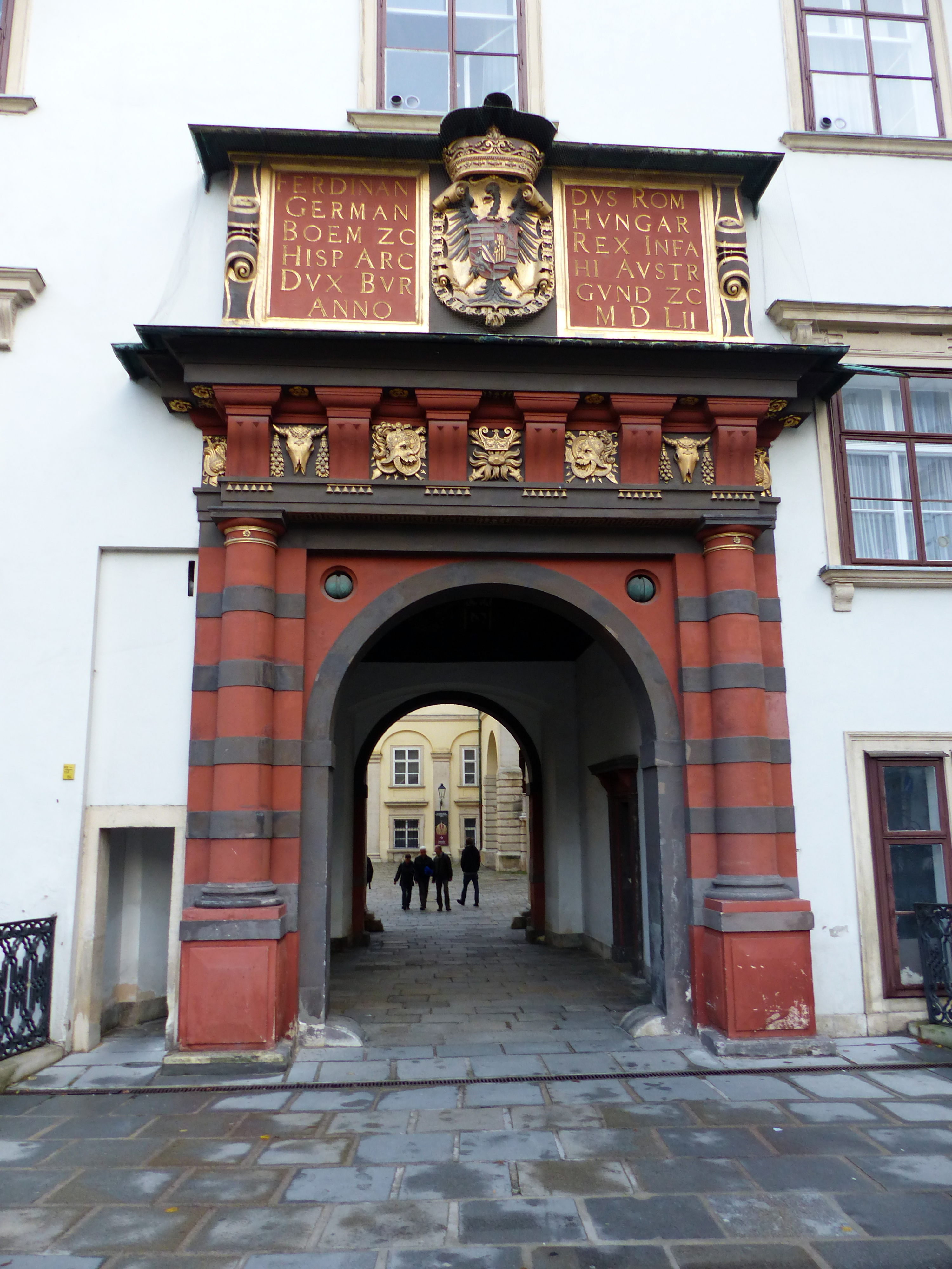 Schweizer Tor, Hofburg in Wien